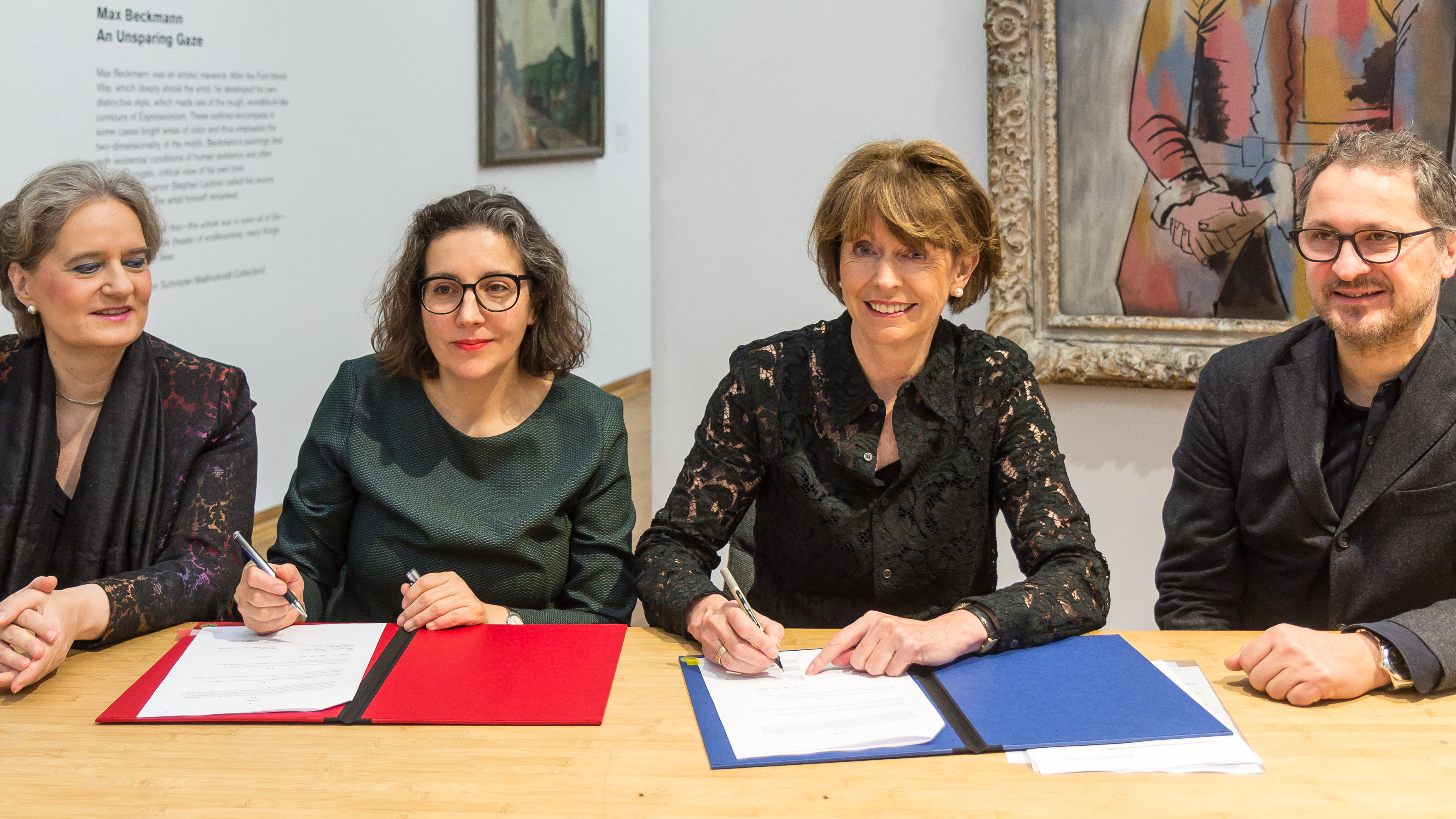 Vertragsunterzeichnung Peter und Irene Ludwig Stiftung und Stadt Köln Foto: Susanne Laugwitz-Aulbach (Kulturdezernentin), Dr. Brigitte Franzen (Vorstand der Peter und Irene Ludwig Stiftung), Henriette Reker (Oberbürgermeisterin von Köln) und Dr. Yilmaz Dziewior (Direktor des Museum Ludwig)